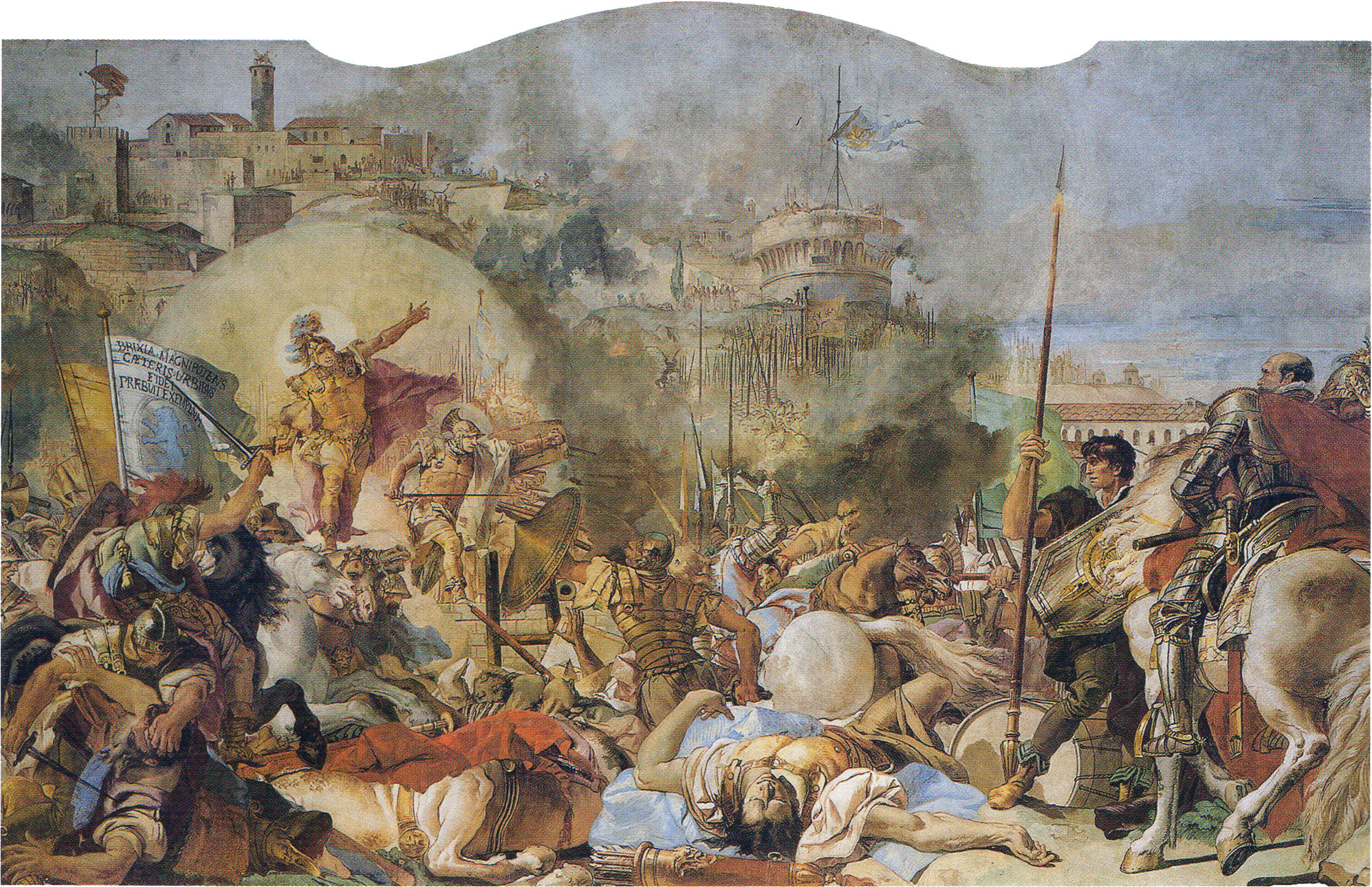 overview